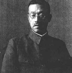 Senkichi Awaya, mayor of Hiroshima